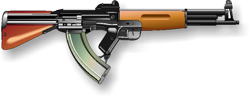 karabinek automatyczny Korobov TKB 408